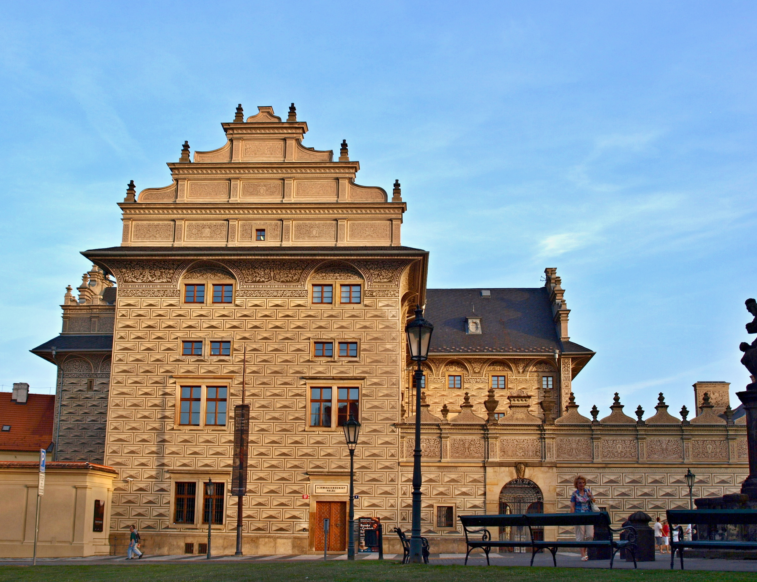 Schwarzenberský palác